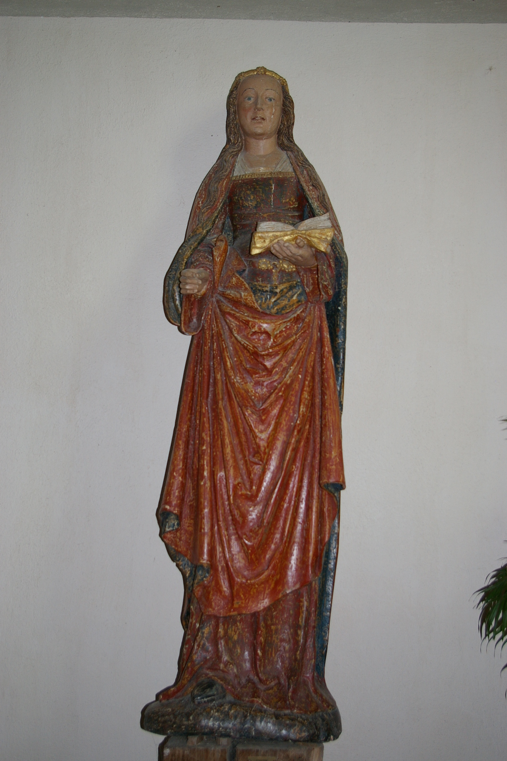 Statue de sainte Suzanne à Sainte-Suzanne (Mayenne)